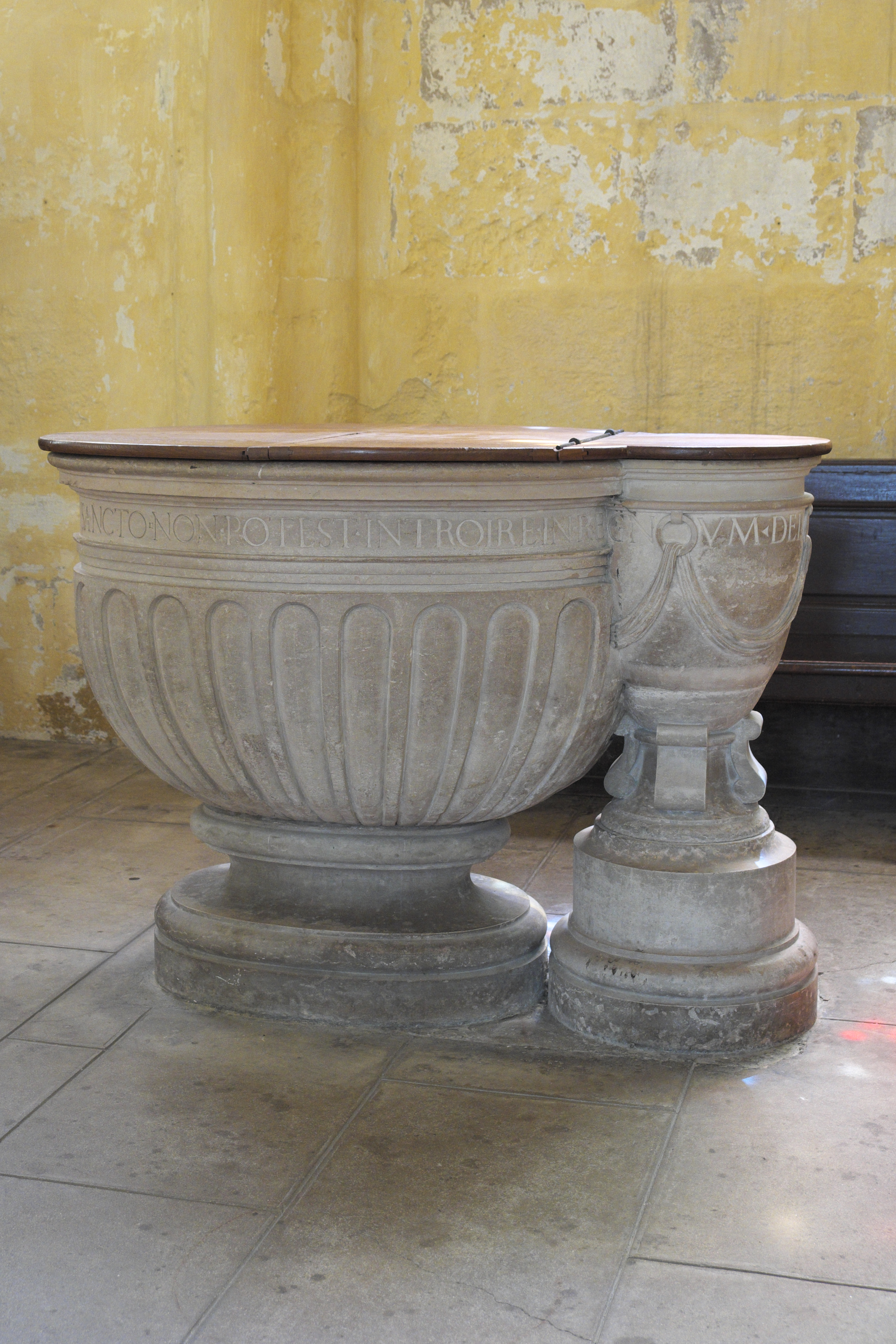 Katholische Pfarrkirche Saint-Martin in Triel-sur-Seine im Département Yvelines (Île-de-France/Frankreich), Taufbecken aus dem 18. Jahrhundert